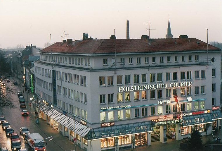 Zeitungs-und Verlagshaus Holsteinischer Courier